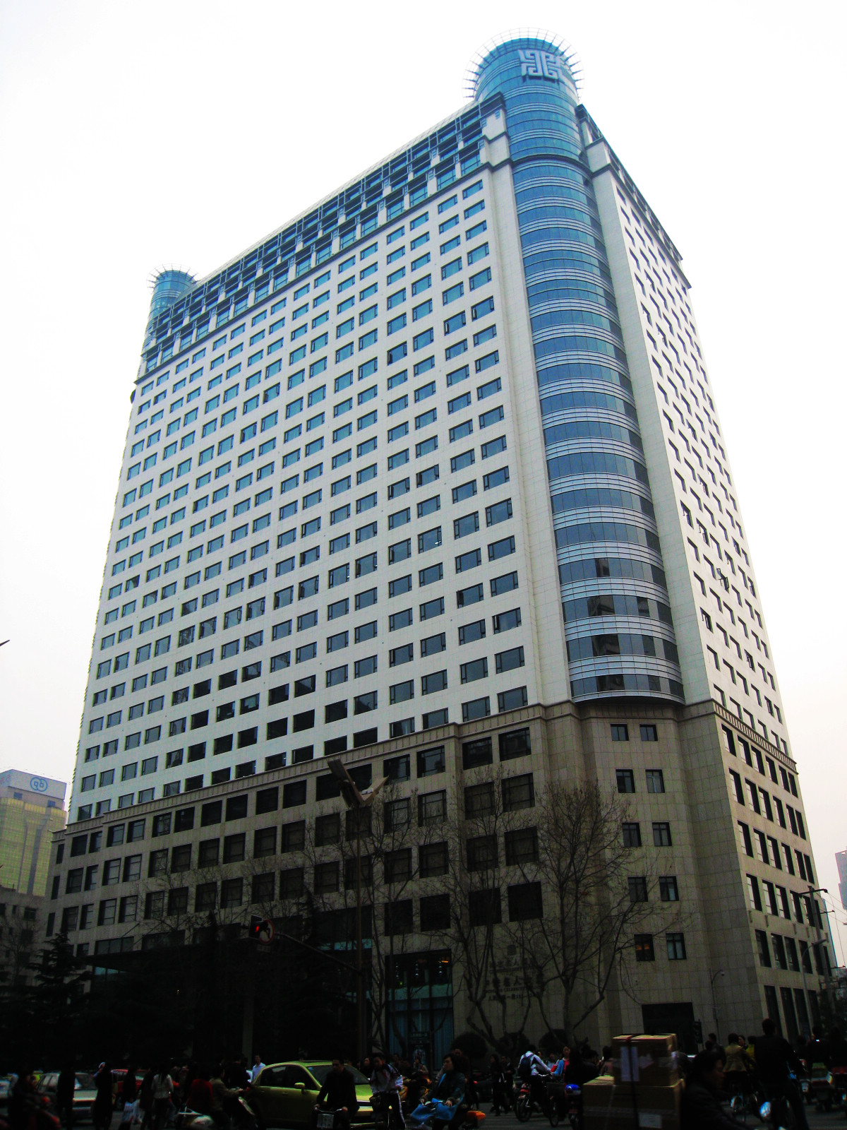 城市名人酒店